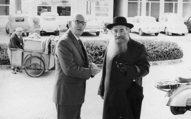 מרדכי וולפסון מזכיר עיריית פתח תקווה (משמאל) עם ראש עיריית בני ברק, הרב ראובן אהרונוביץ. הרב אהרונוביץ חבוש מגבעת שחורה ולבוש מעיל ארוך, על ידו השמאלית כפפת עור ועל זרועו תלויה מטריה. השניים עומדים במגרש חניה, לימינם קטנוע ומאחור אדם חבוש קסקט עם עם תלת-אופן לנשיאת מטען.